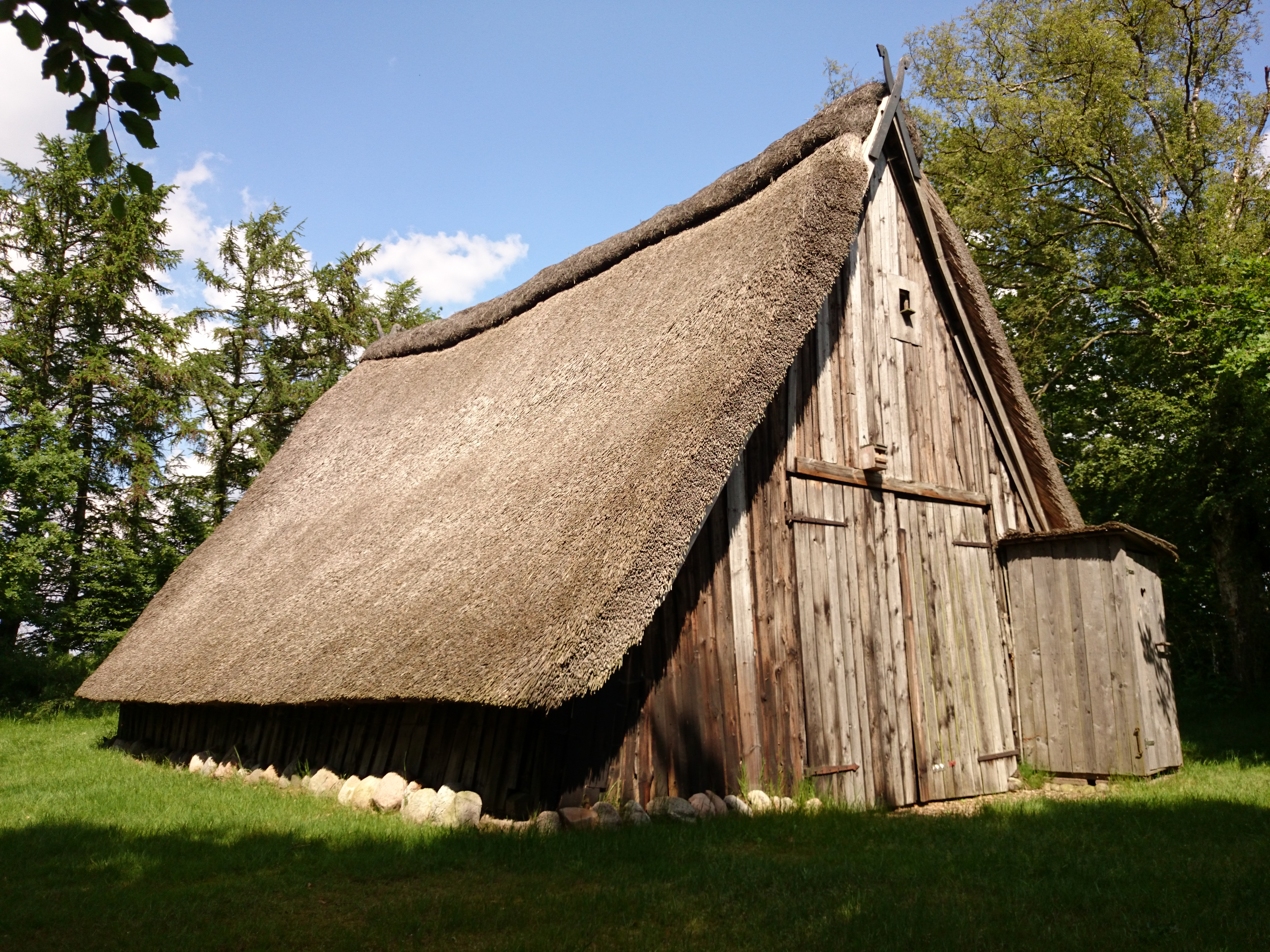 Historischer Schafstall von 1750 in Fintel.